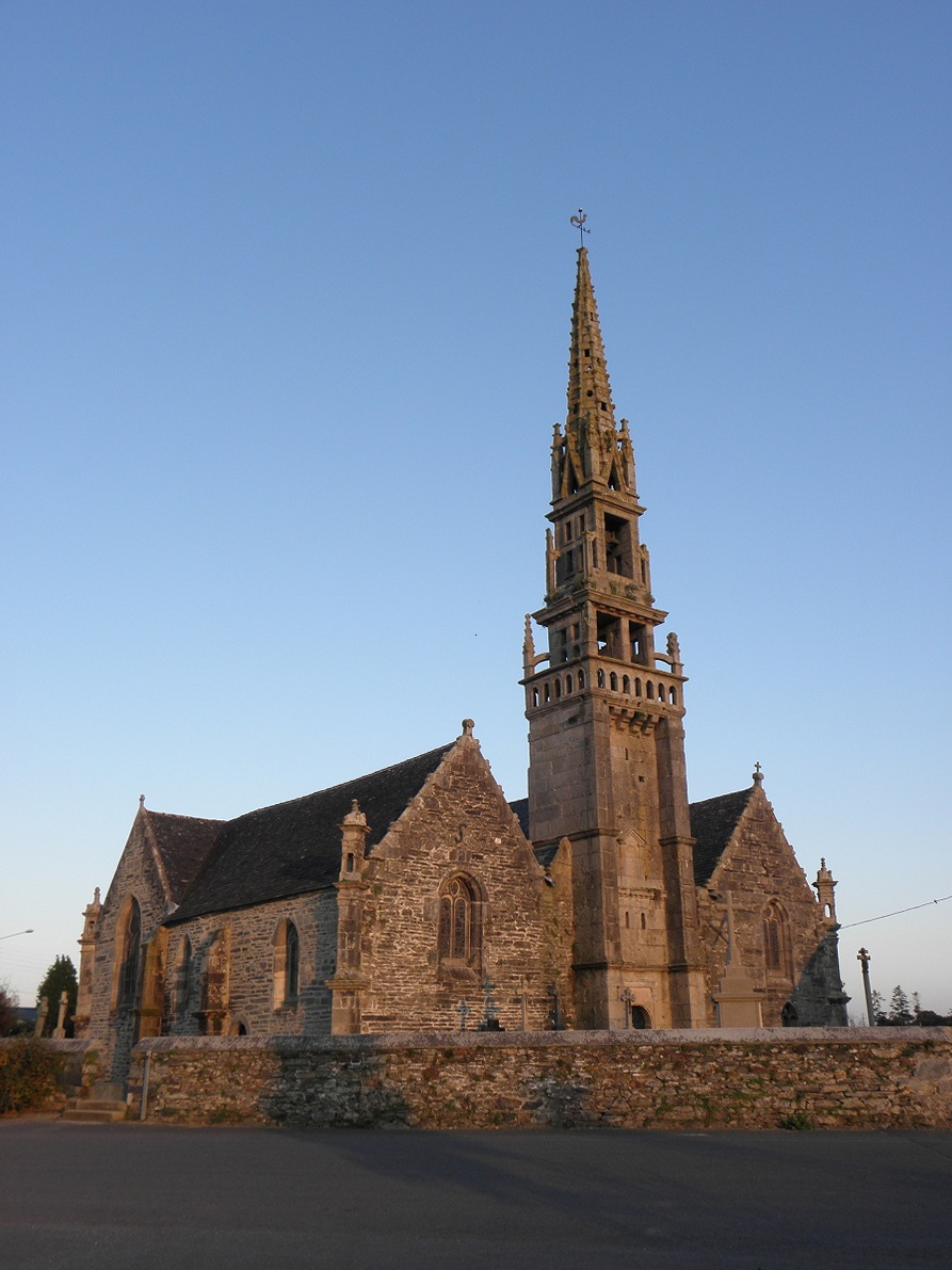 Façade occidentale de l'église saint-Éguiner de Loc-Éguiner (29Façade occidentale de l'église saint-Éguiner de Loc-Éguiner (29). .